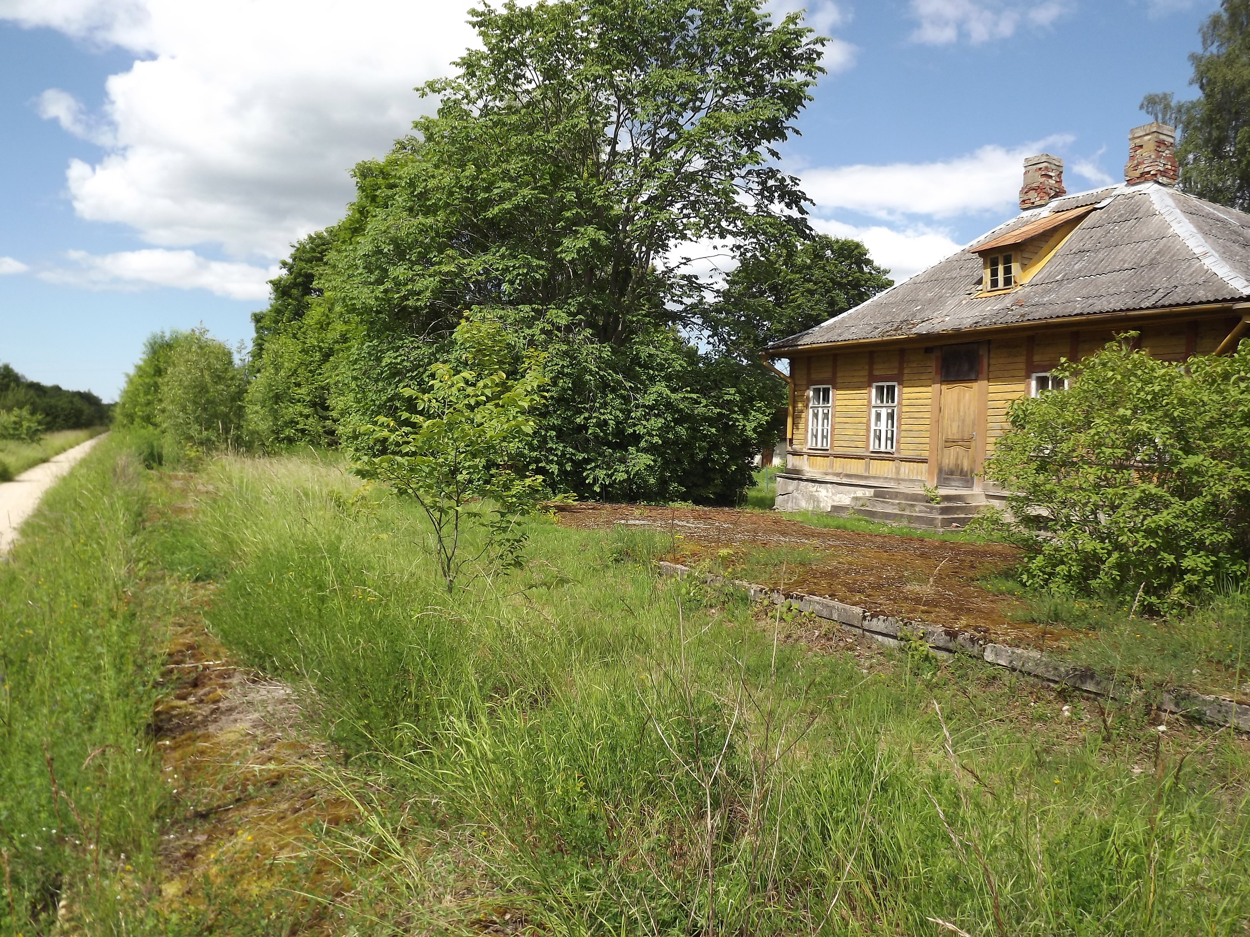 Endine Taebla raudteejaam.